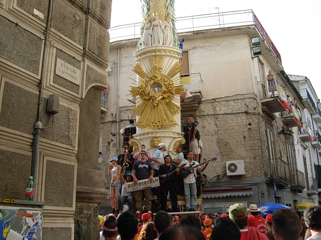 Festa dei Gigli di Nola 2007 Foto personale concessa in PD